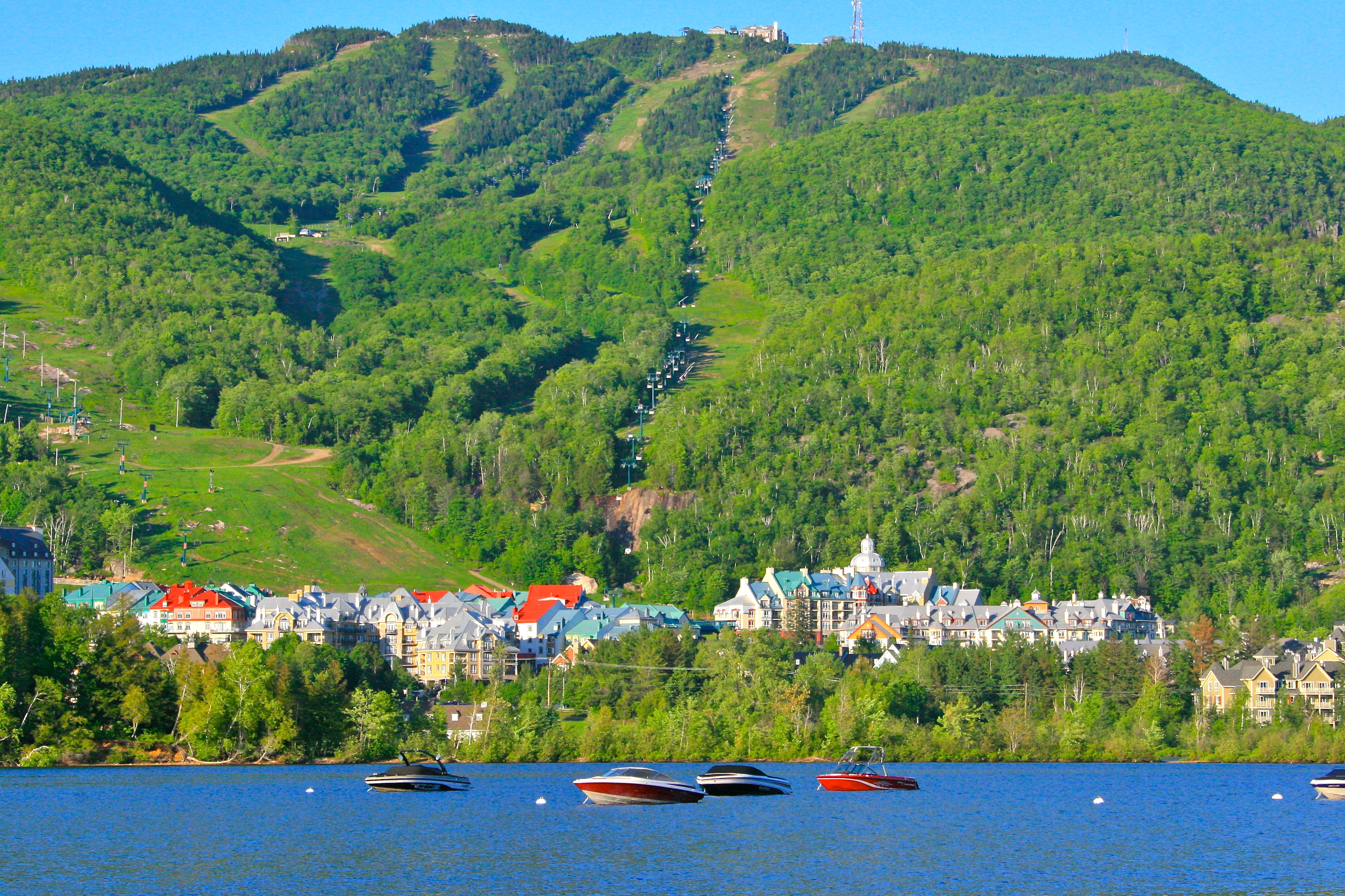 Village, station, Mont Tremblant